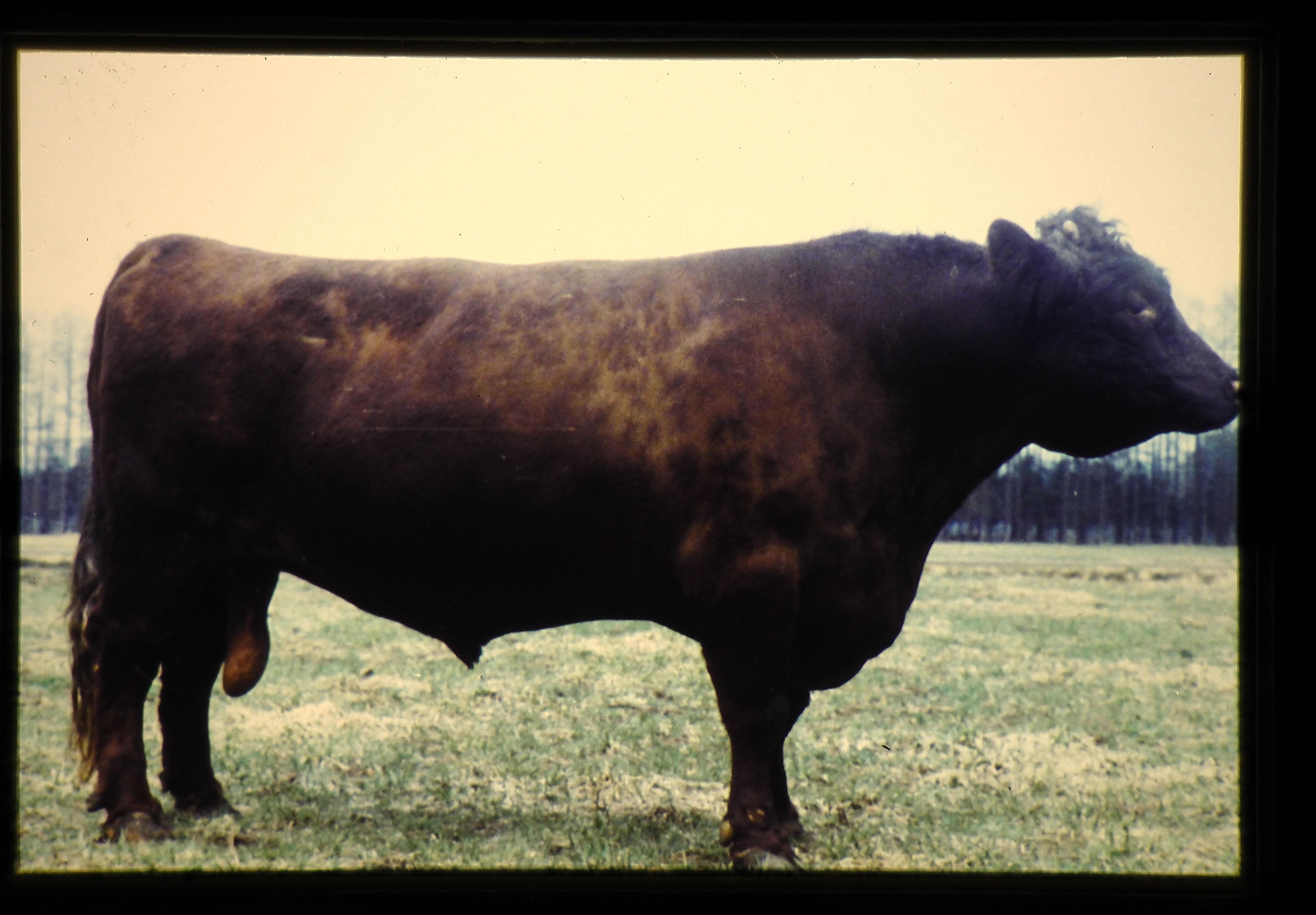 JIRCAS Photo Archive Author: 松川正 Description: 毛色は濃赤褐色で、そけい部に白斑のあるものもある。鼻鏡、蹄は肉色。角は側上内方へのびる。中躯は長く、体積があるが、後躯は乏しい。中型でやや小さく、体重は♂800kg、体高は♂140kg、肉役体型比率は7:3｡ Country: 日本 (Japan) Keywords: 日本,青森,岩手,秋田,北海道,畜産 Slide no. 01-064-09 本コンテンツは、政府標準利用規約第2.0版(クリエイティブ・コモンズ 表示 4.0 国際 ライセンス（CC BY）互換)に基づき、出典を明記の上で利用できます。利用条件の内容については「 JIRCAS Webサイトの利用について 」をご参照ください。 印刷物、調査研究等でご利用頂いた場合は、 お問い合わせフォーム にてお知らせ頂ければ幸いです（任意） This content is provided under the terms and conditions of the JIRCAS Website Terms of Use or Creative Commons Attribution 4.0 International (CC BY 4.0) license.